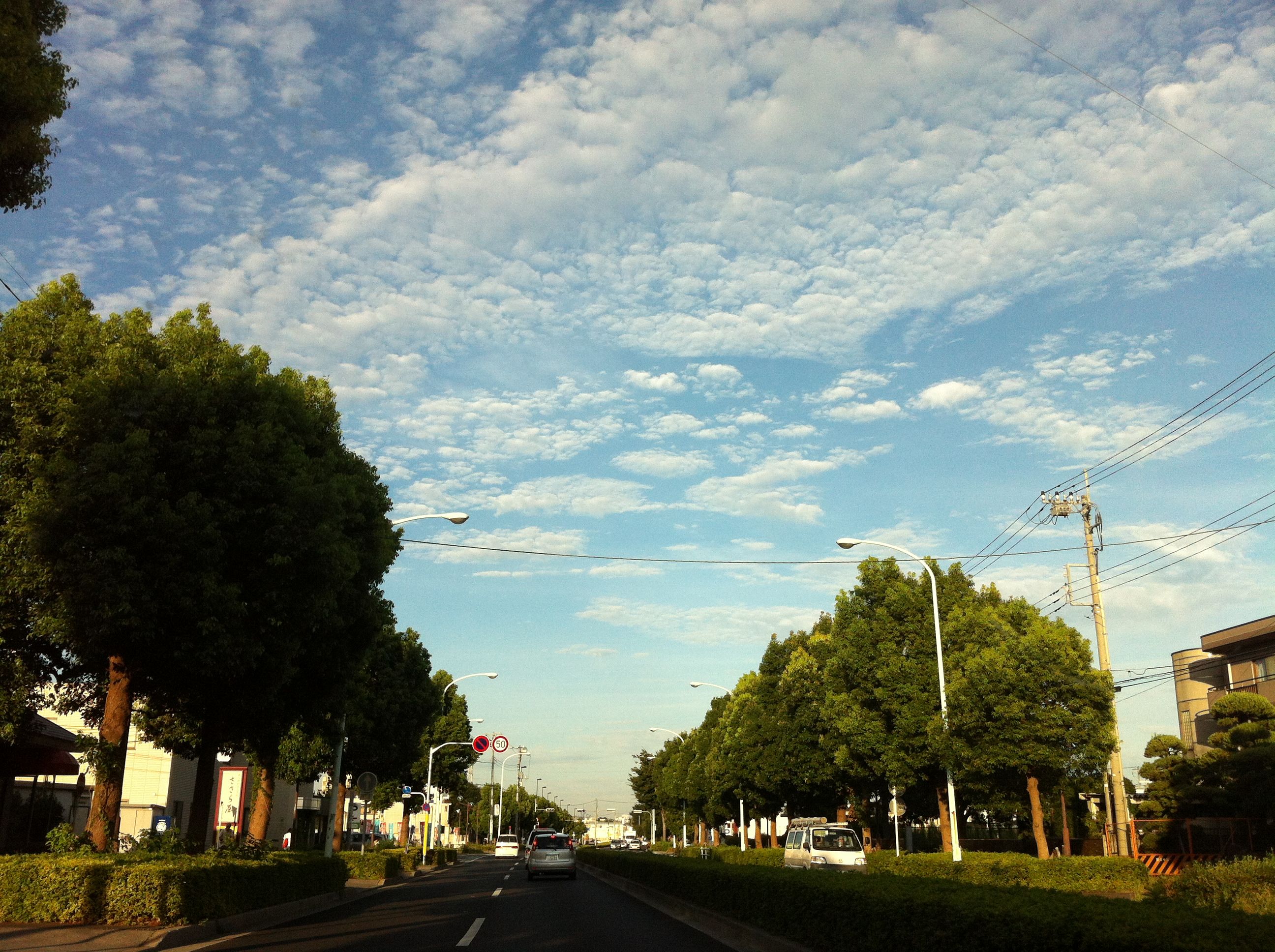 4 Chome Jindaiji Higashimachi, Chōfu-shi, Tōkyō-to 182-0012, Japan